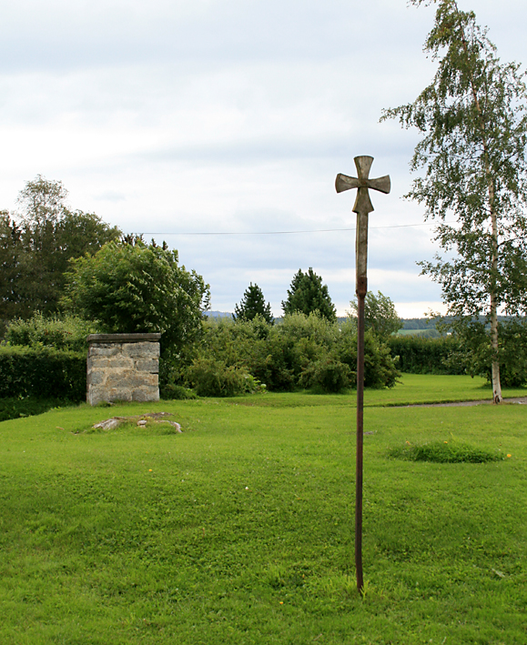 Det bevarte steinaleteret fra middelalderkirka på Dyste, Østre Toten. Kirka ble bygd på 1100- eller 1200-tallet, og revet i 1780-åra.